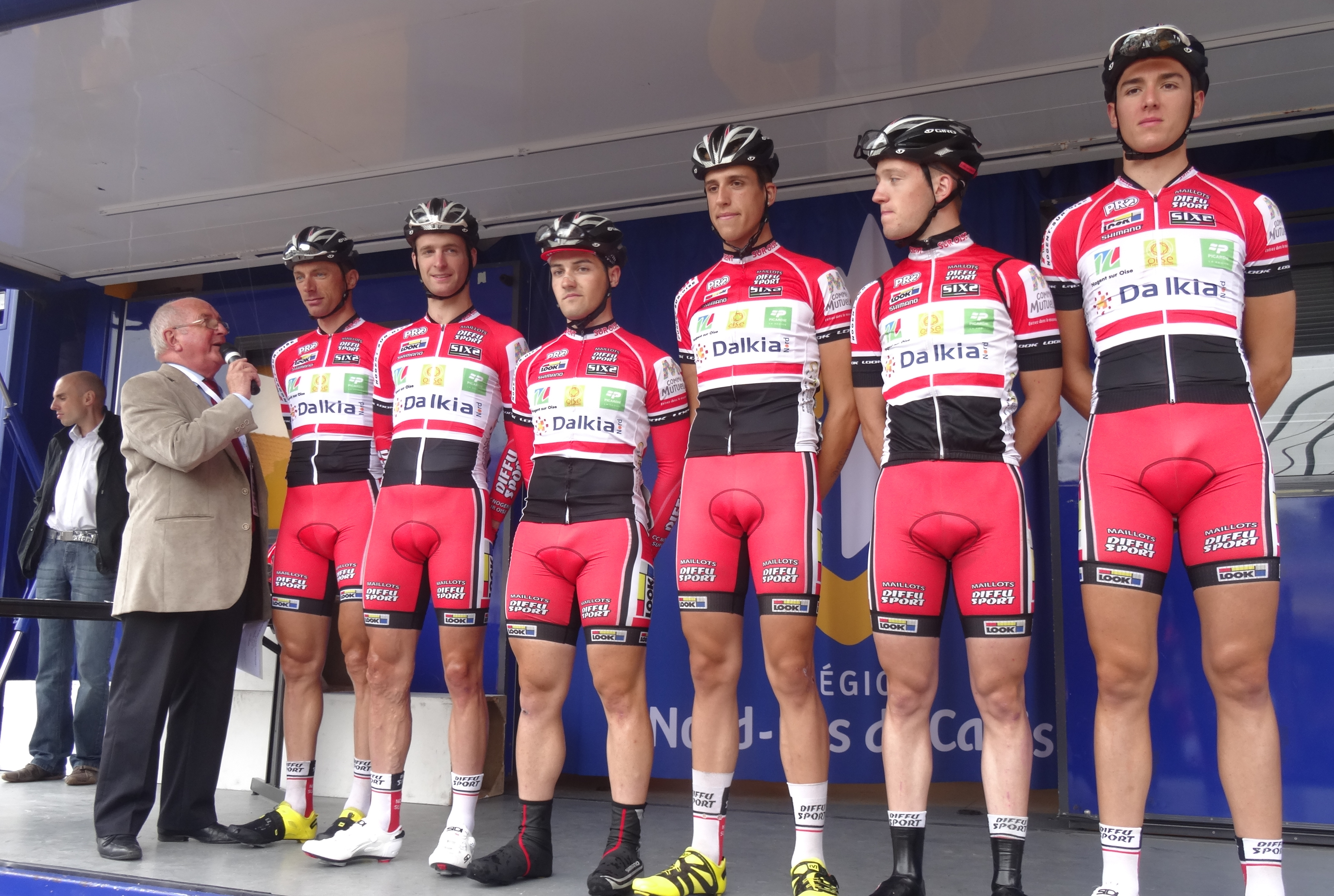 Reportage photographique réalisé le dimanche 13 juillet à l'occasion du départ et de l'arrivée de la Ronde pévéloise 2014 à Pont-à-Marcq, Nord-Pas-de-Calais, France.